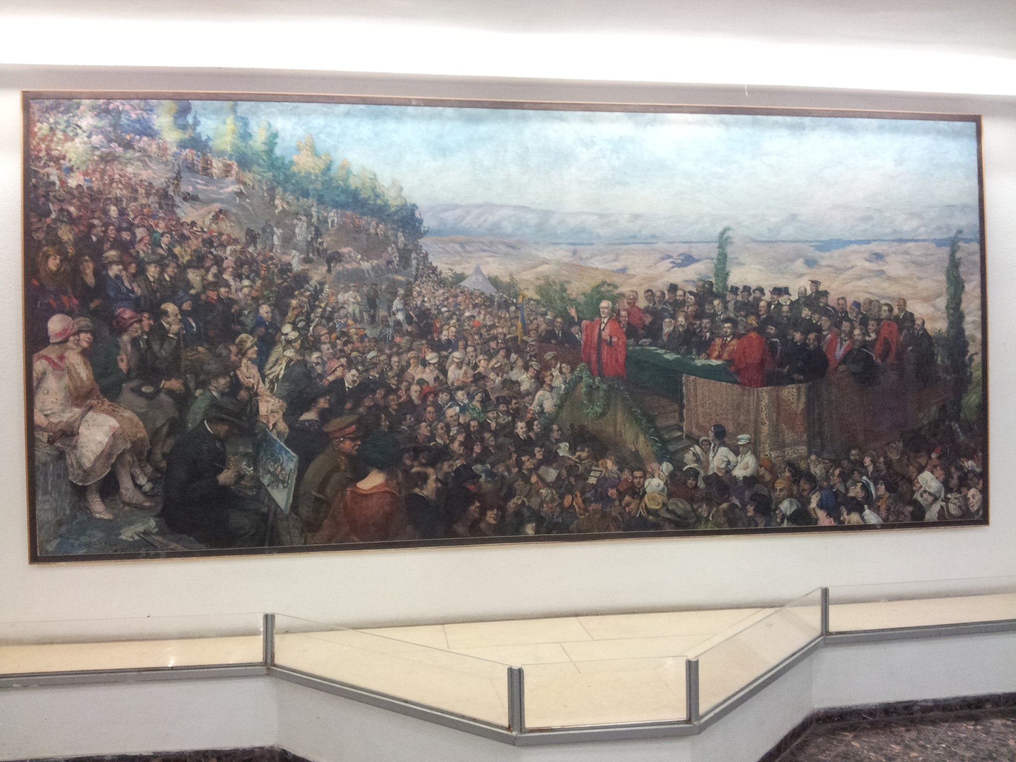 טקס הכרזת האוניברסיטה העברית בציורו של ליאופולד פיליכובסקי, 1925